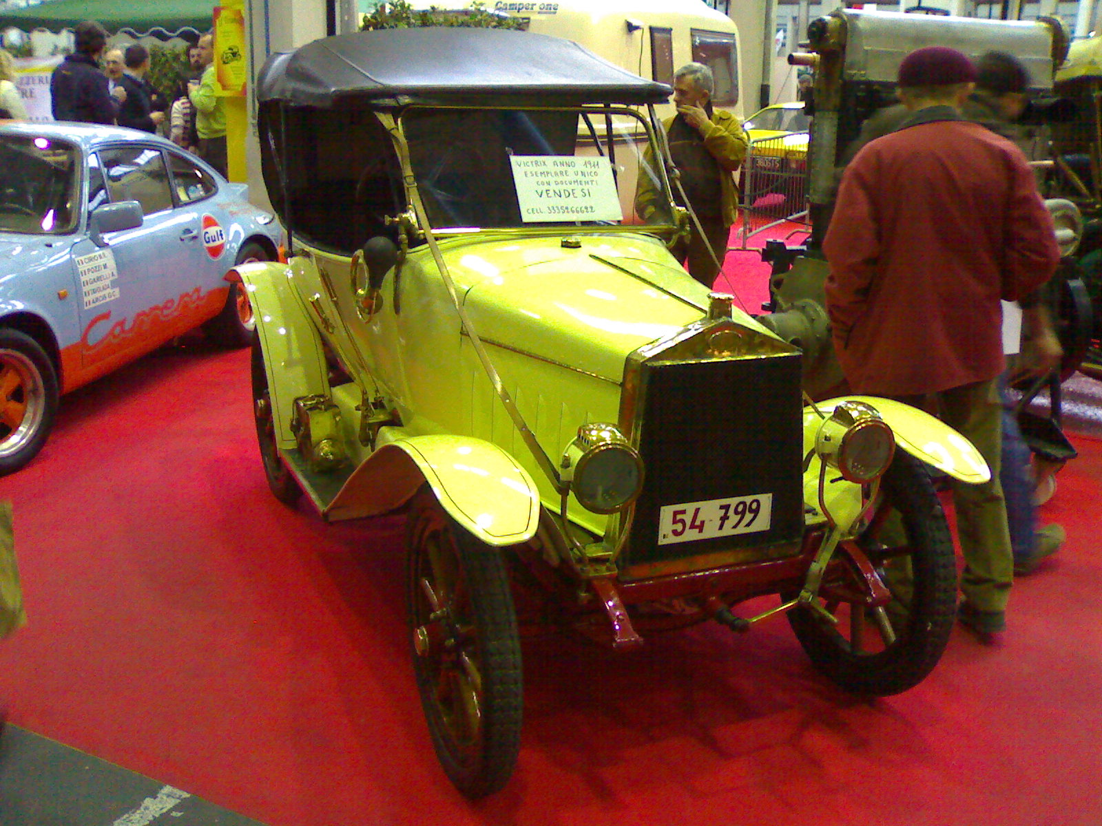 Victrix del 1911, automobile costruita a Torino dalla OMT (officine Meccaniche Torinesi) su licenza Peugeot. Due esemplari sopravvissuti.